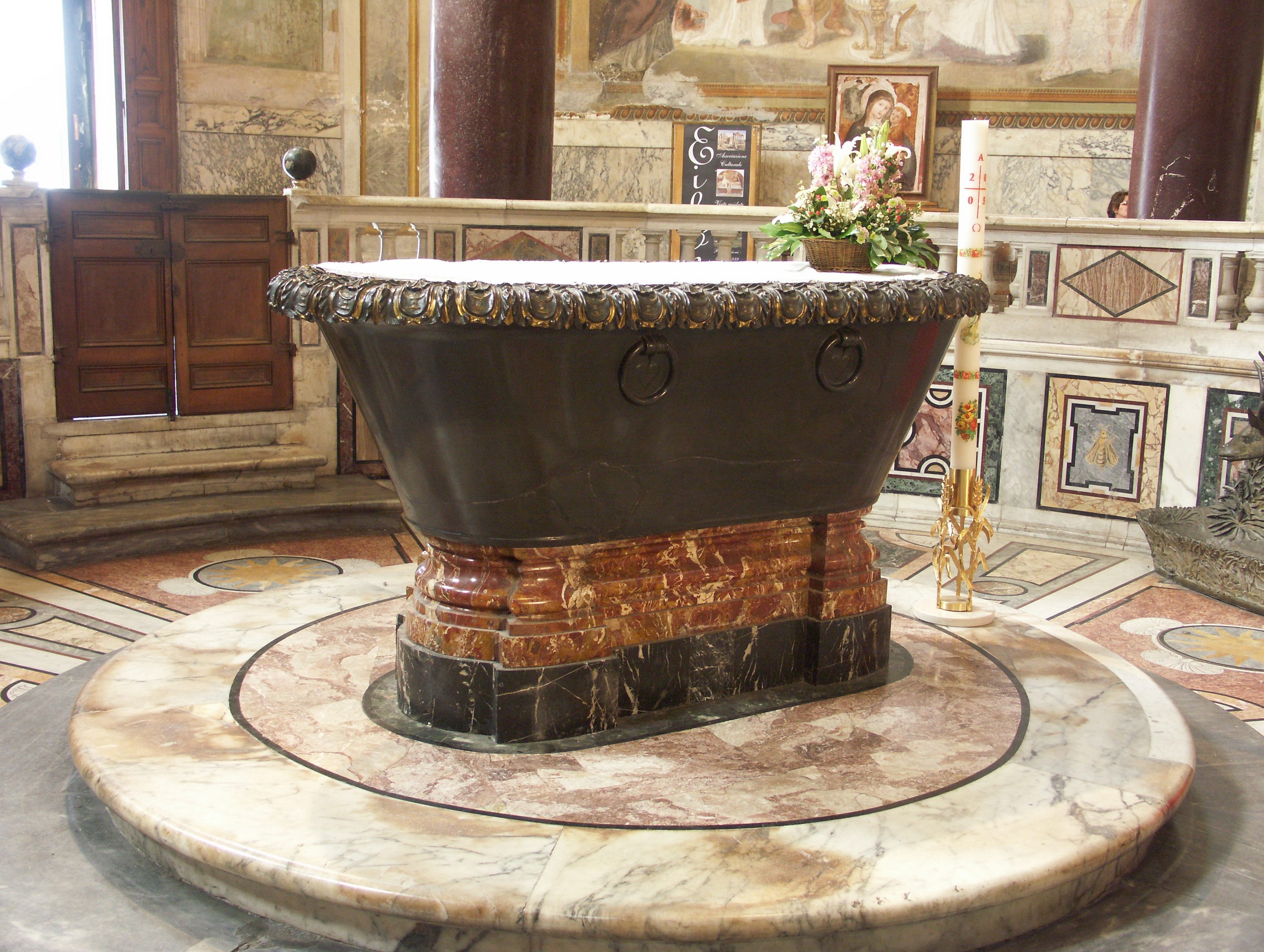 Rom, San Giovanni in Lateran, Innenraum des Baptisteriums (Altar)